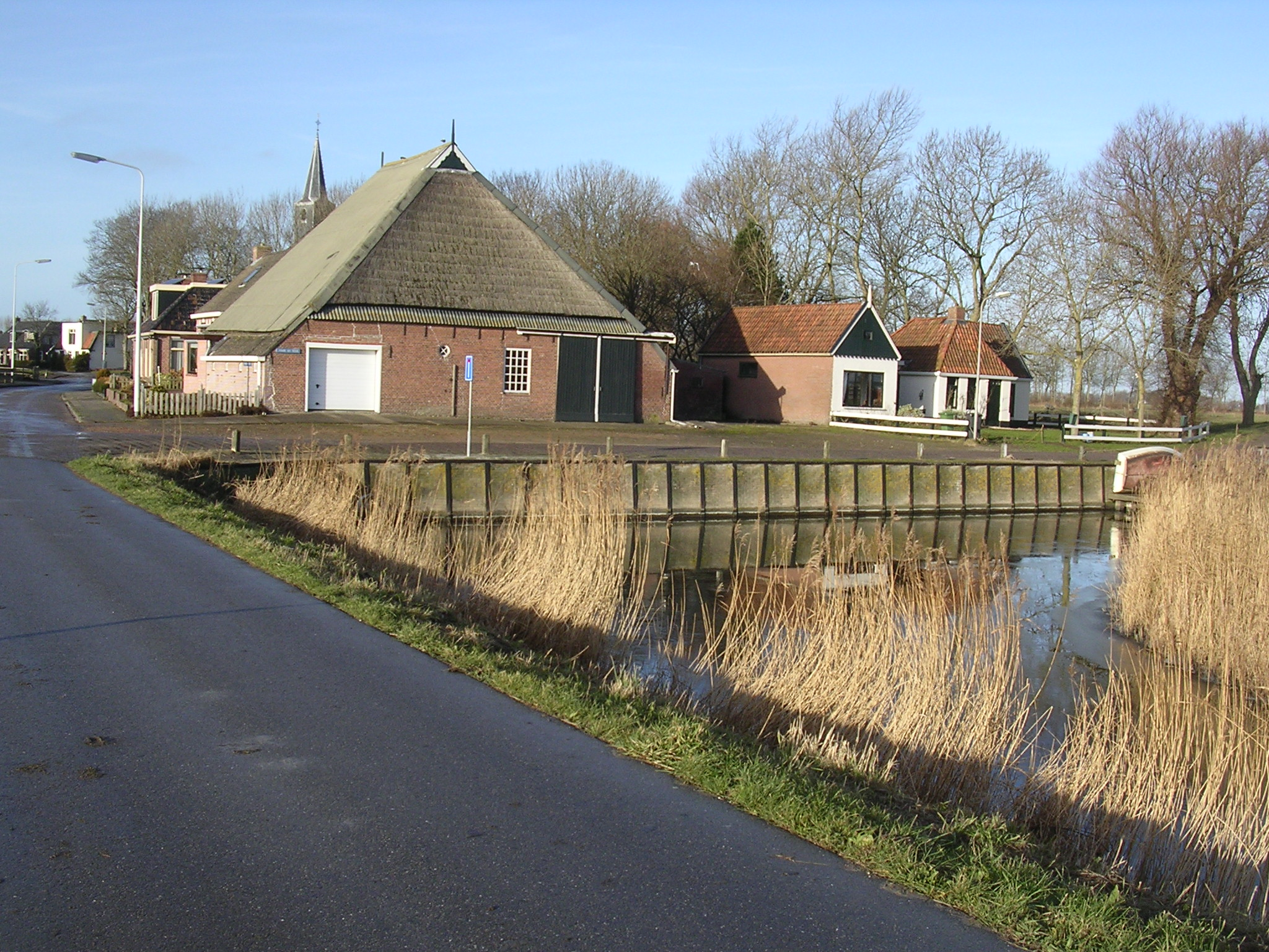 Hoek en Waad, Loswal fan Ljussens (picture of Lioessens)